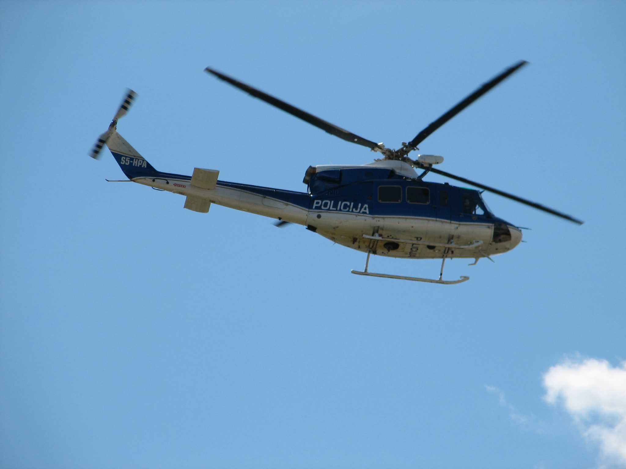 Slovenian police helicopter S5-HPA, model Agusta Bell AB-412